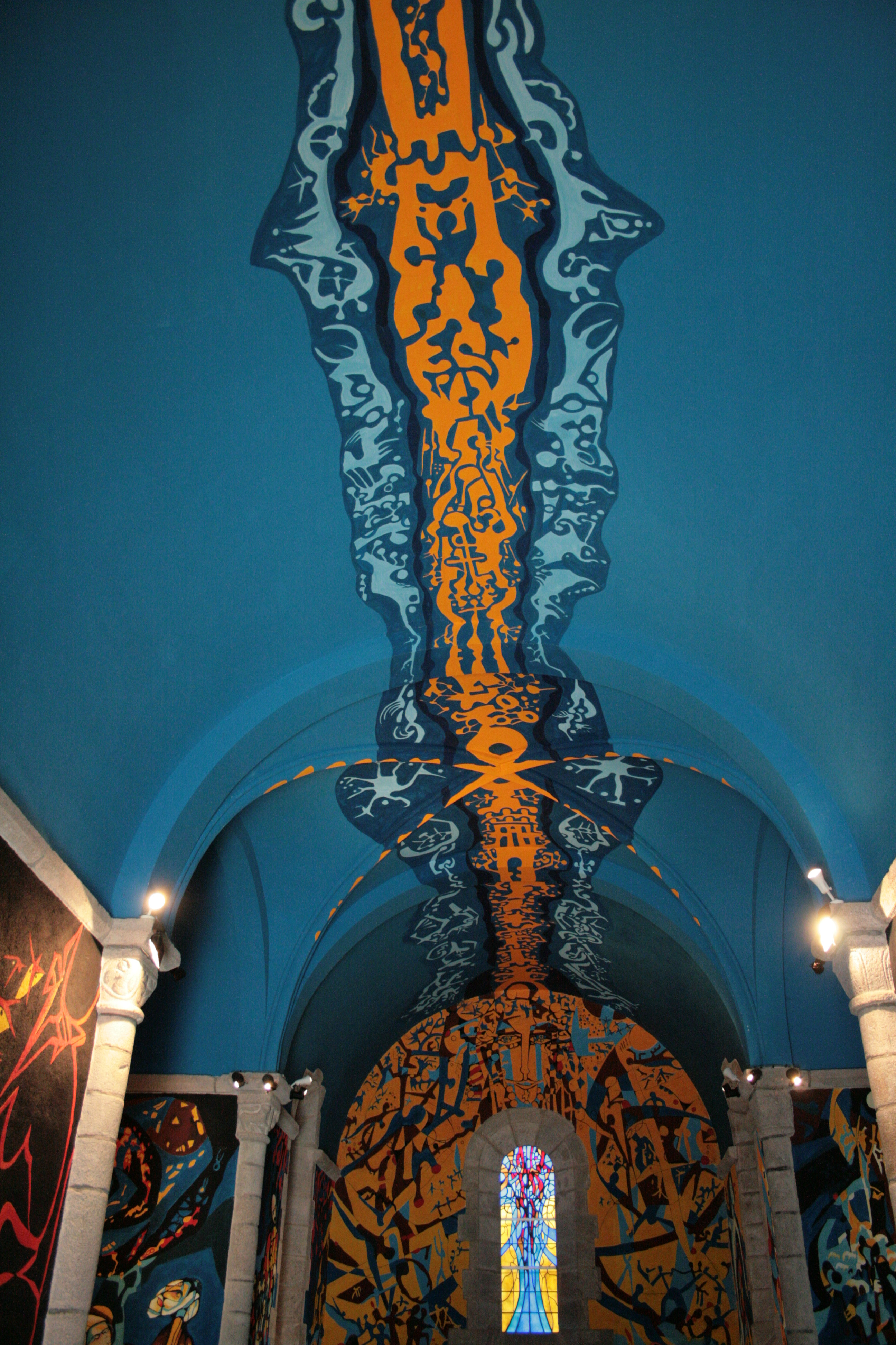 Sous-Parsat, Creuse, France. L'église : fresques de Gabriel Chabrat. La voûte et vue vers l'abside. La voûte a été peinte postérieurement aux murs, vers 1996.